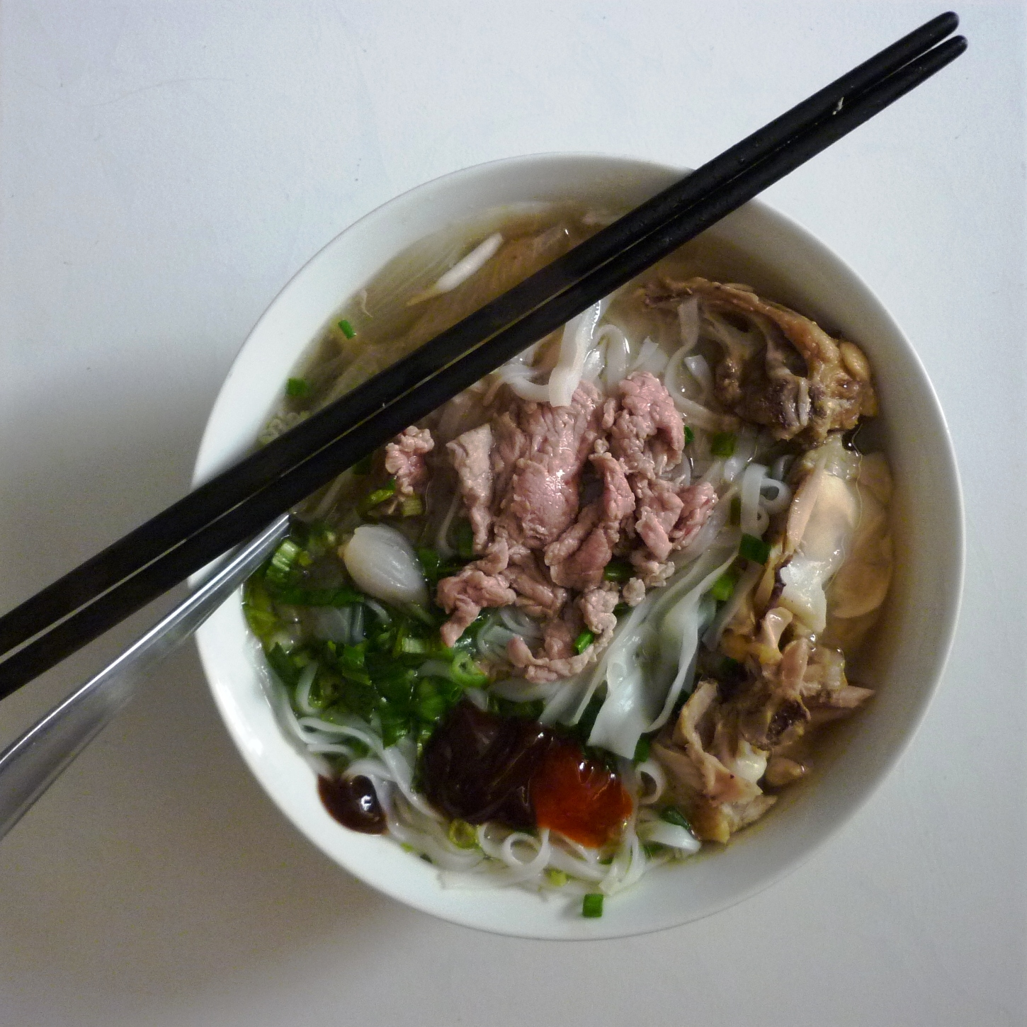 Một tô phở bò tái chưa cho rau sống vào.